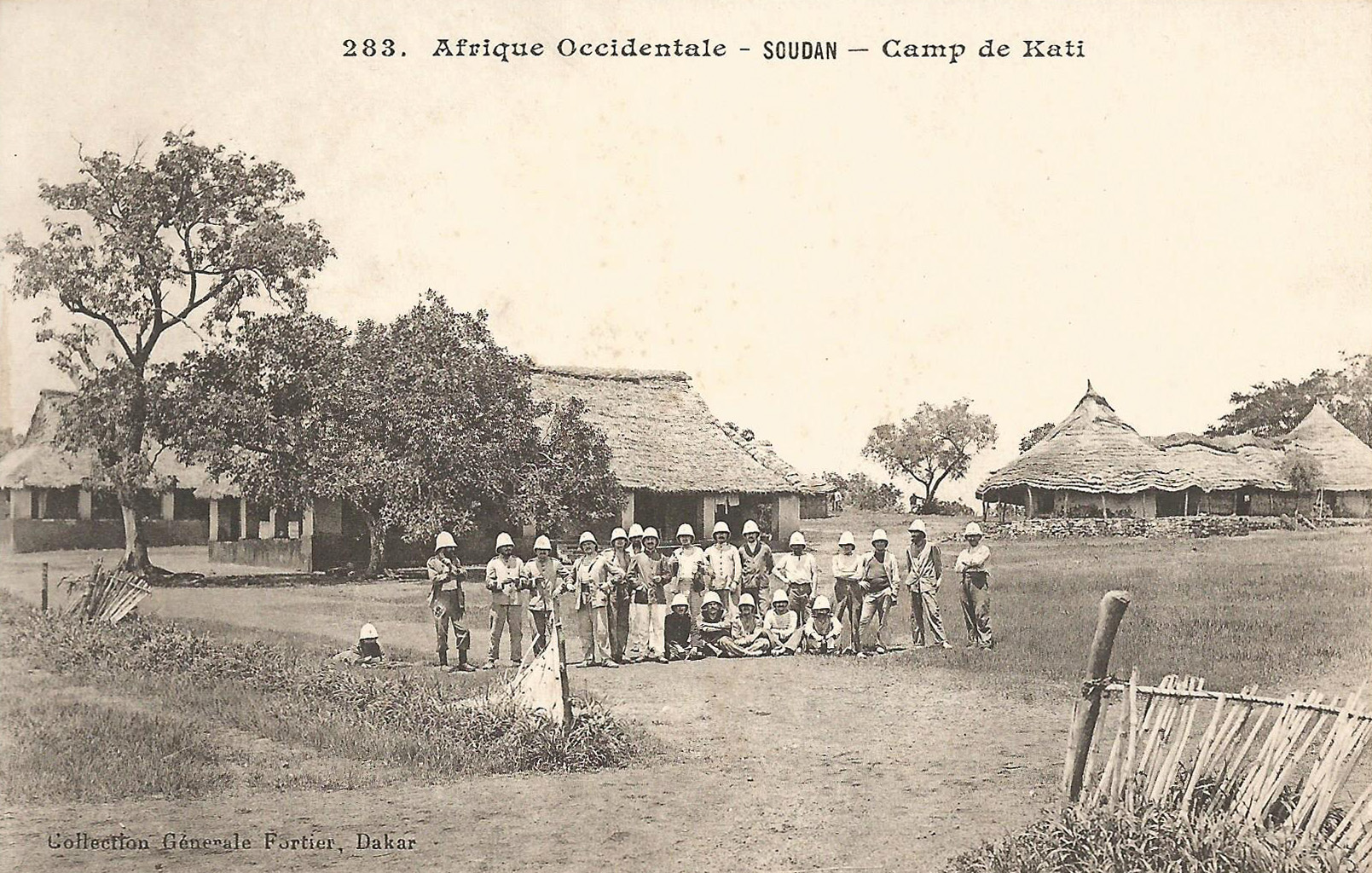 François-Edmond Fortier, Camp de Kati. Afrique Occidentale - Soudan.